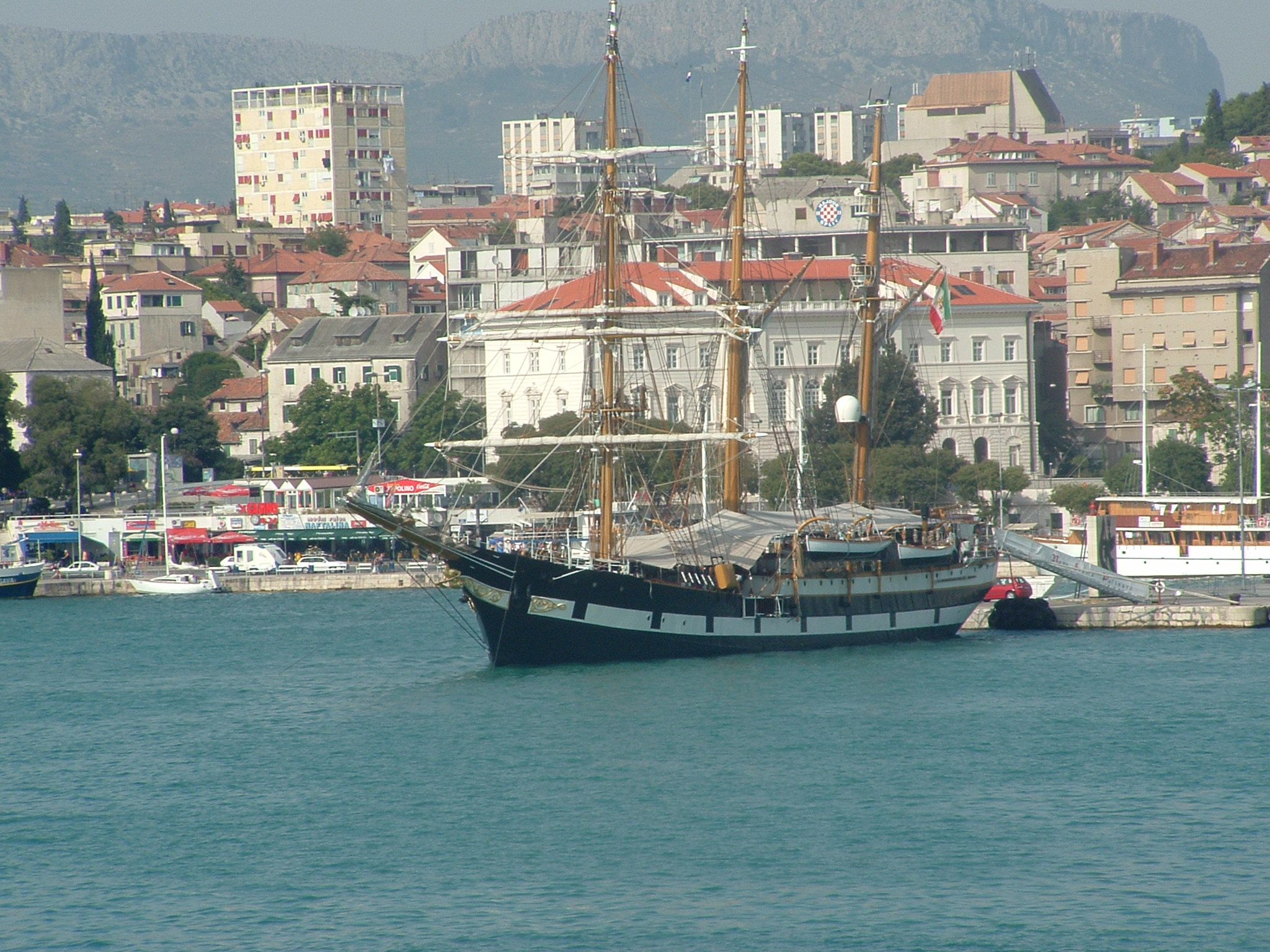 La nave Palinuro della Marina Militare Italiana a Spalato il 30 luglio 2005